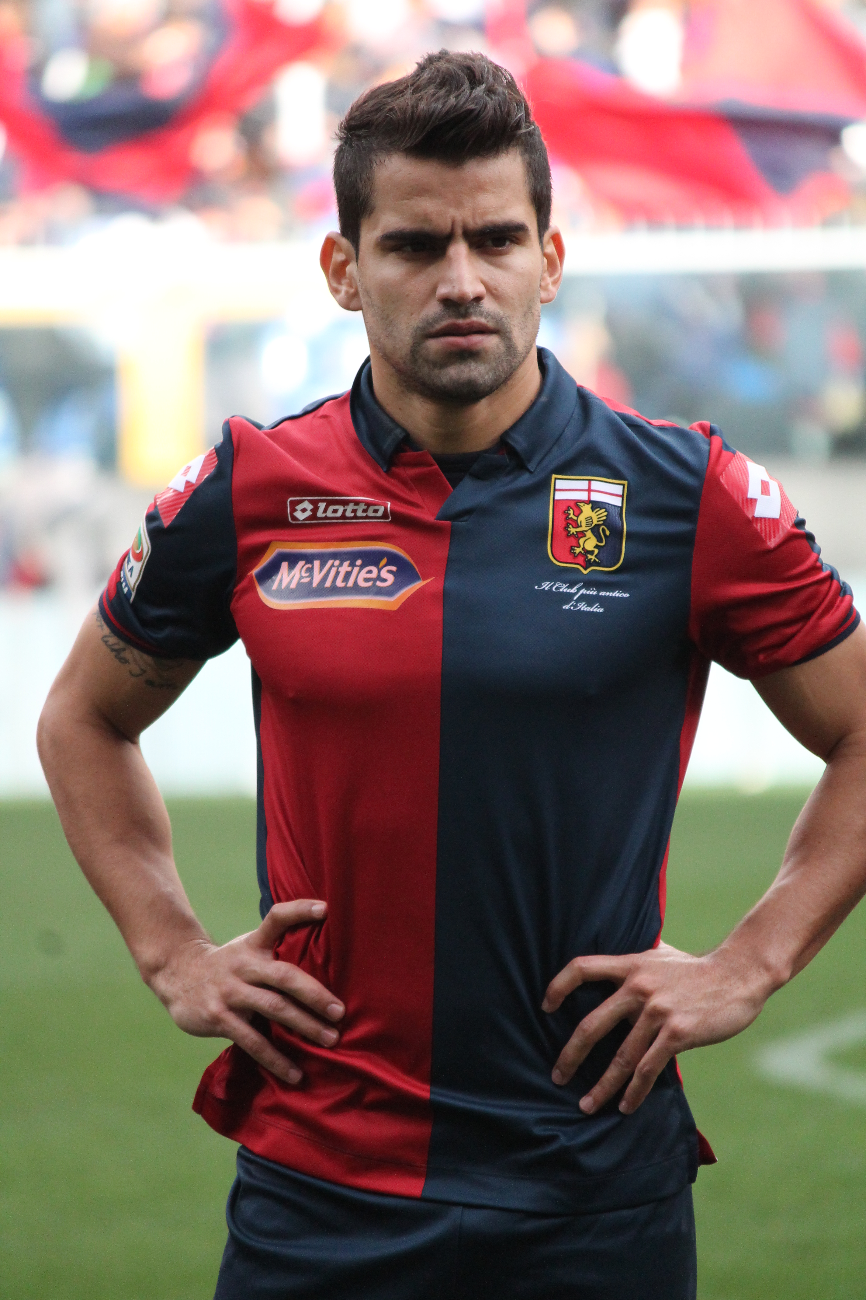 Tomás Rincón - Genoa C.F.C.